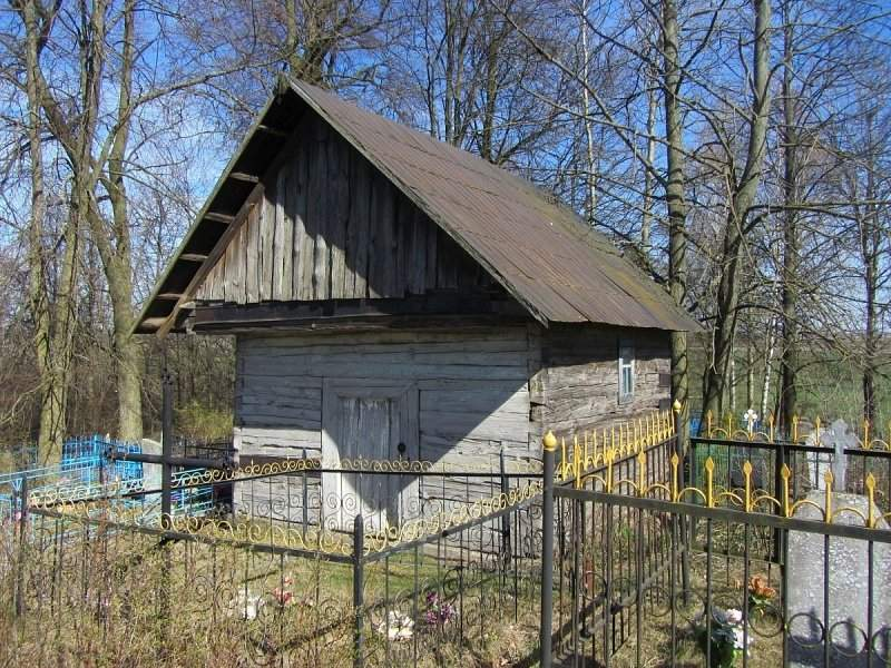 Даўгінава (Ярэміцкі сельсавет). Капліца